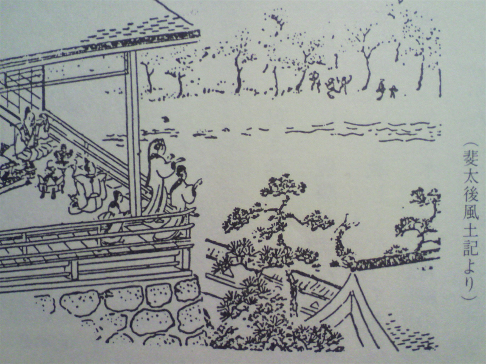 桜野公園の資料 斐太後風土記